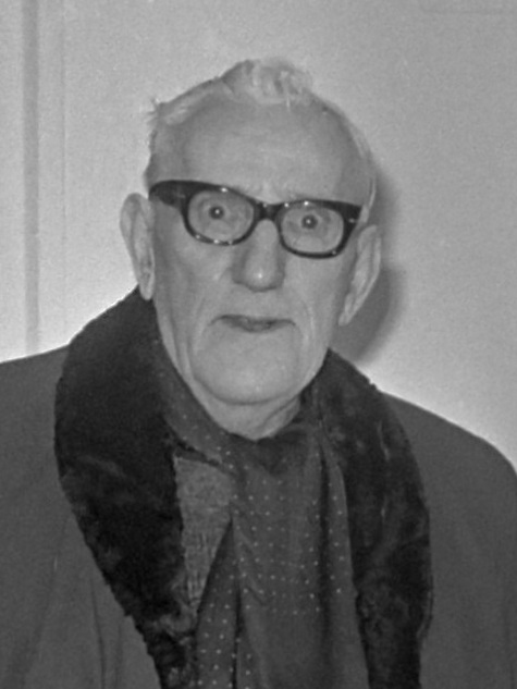 Proces Hans van Z. en Oude Nol/Ouwe Nol 18 februari 1969